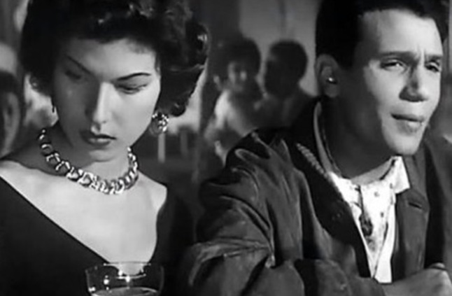 مصرى: كوثر شفيق مع عبد الحليم حافظ فى فيلم الوساده الخاليه